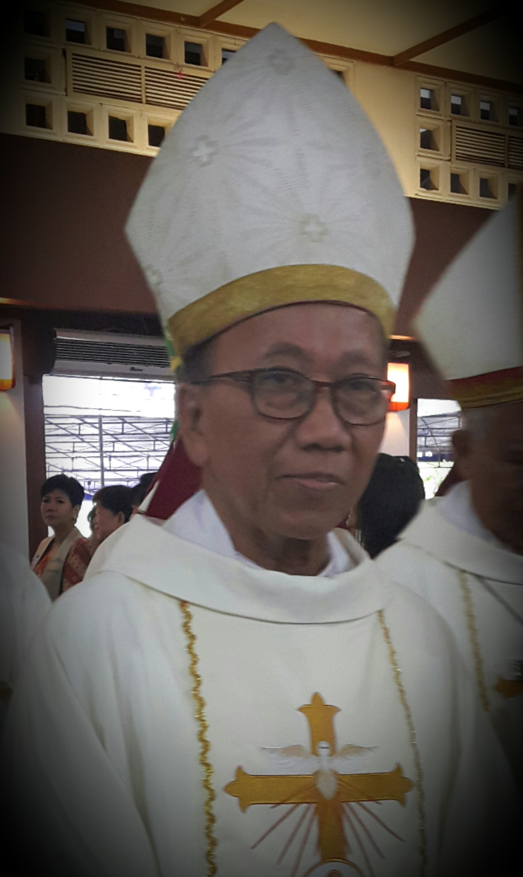 Mgr. Aloysius Sudarso, Uskup Agung Palembang